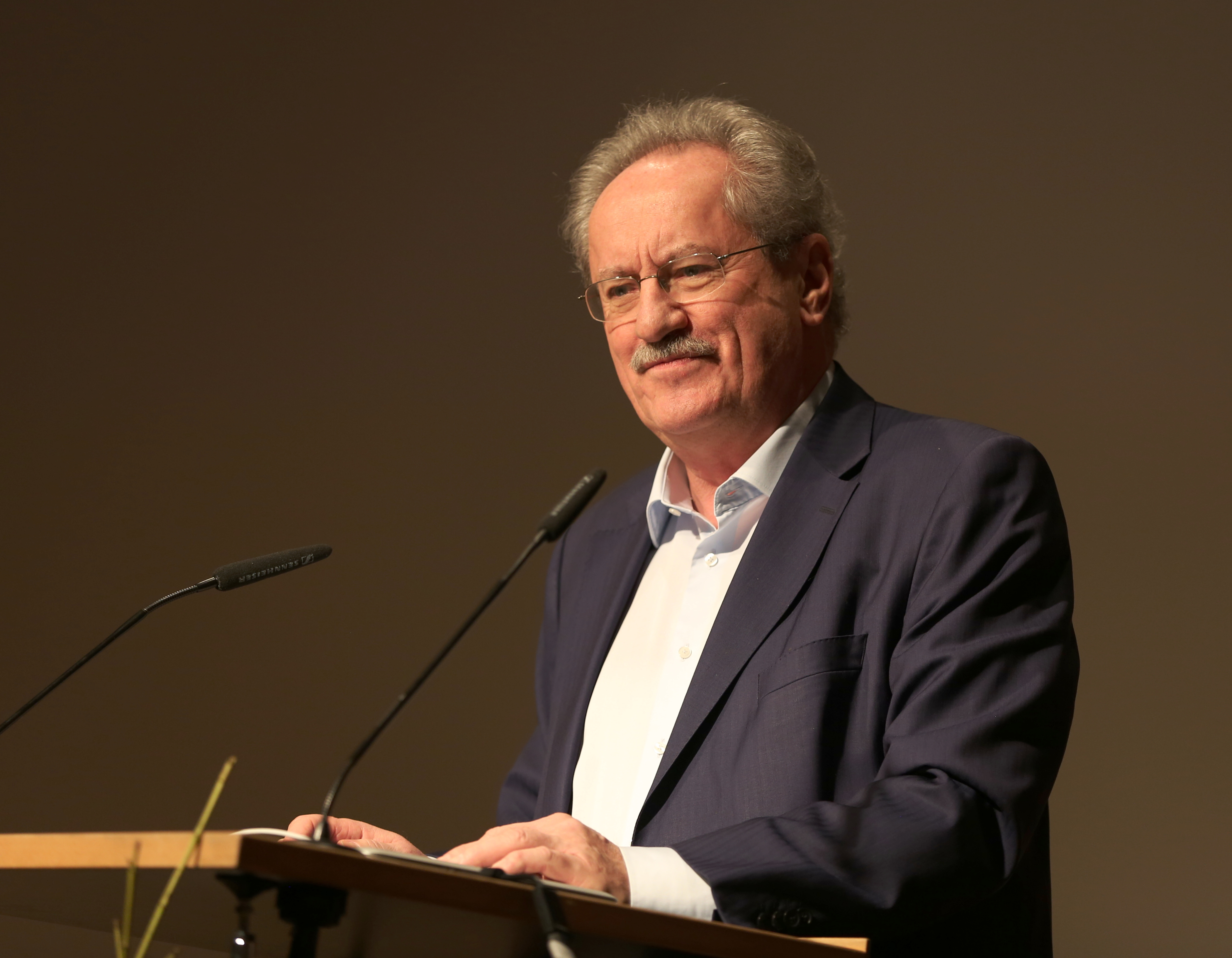 Christian Ude, ehemaliger Oberbürgermeister von München und Ehrenbürger von München bei der Verleihung des Ernst-Hofrichter-Preises 2019